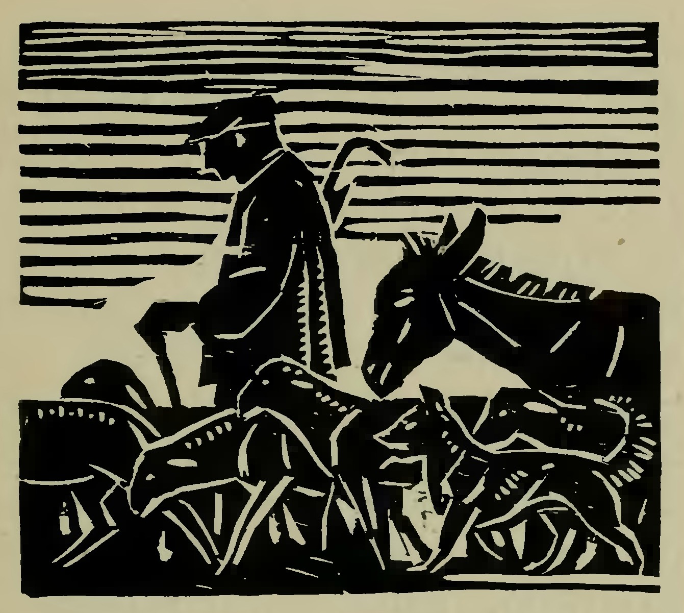 La Noël de mes enfants